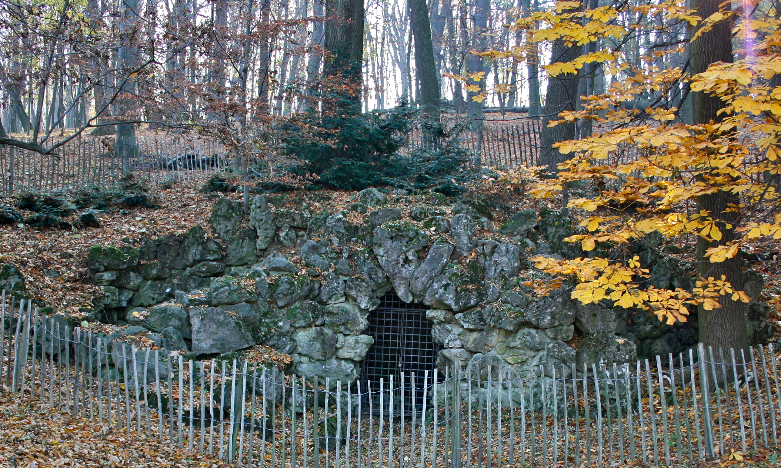 Grotte im Pötzleinsdorfer Schlosspark im Spätherbst.